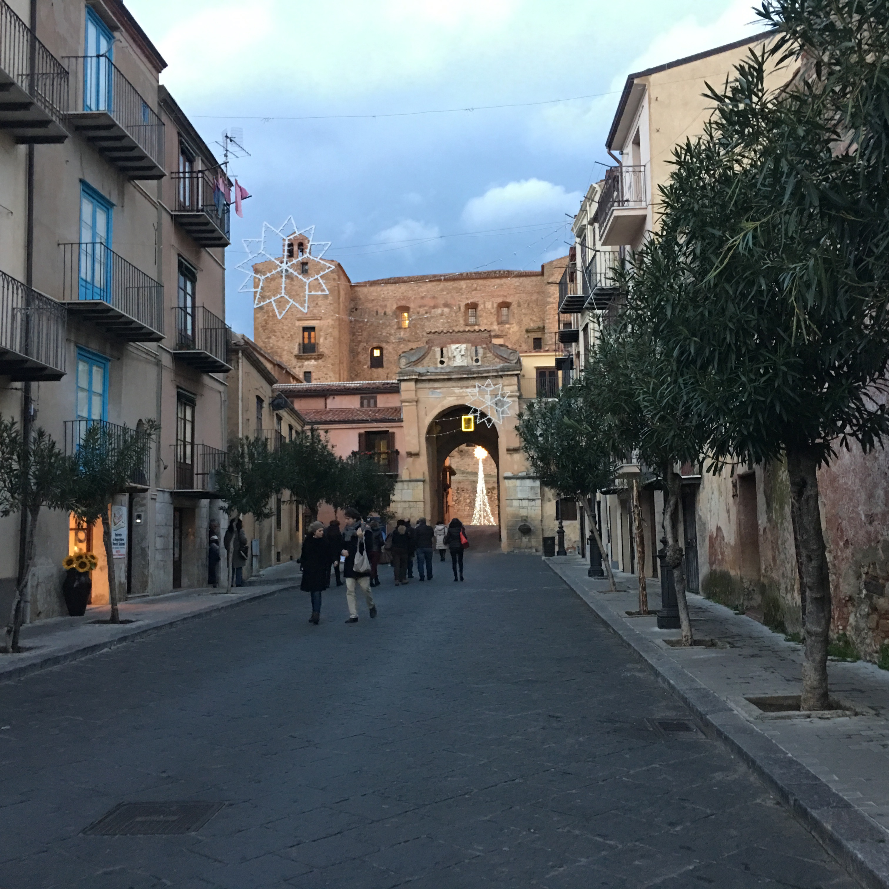 Via Sant'Anna, a Castelbuono. Sullo sfondo il castello.